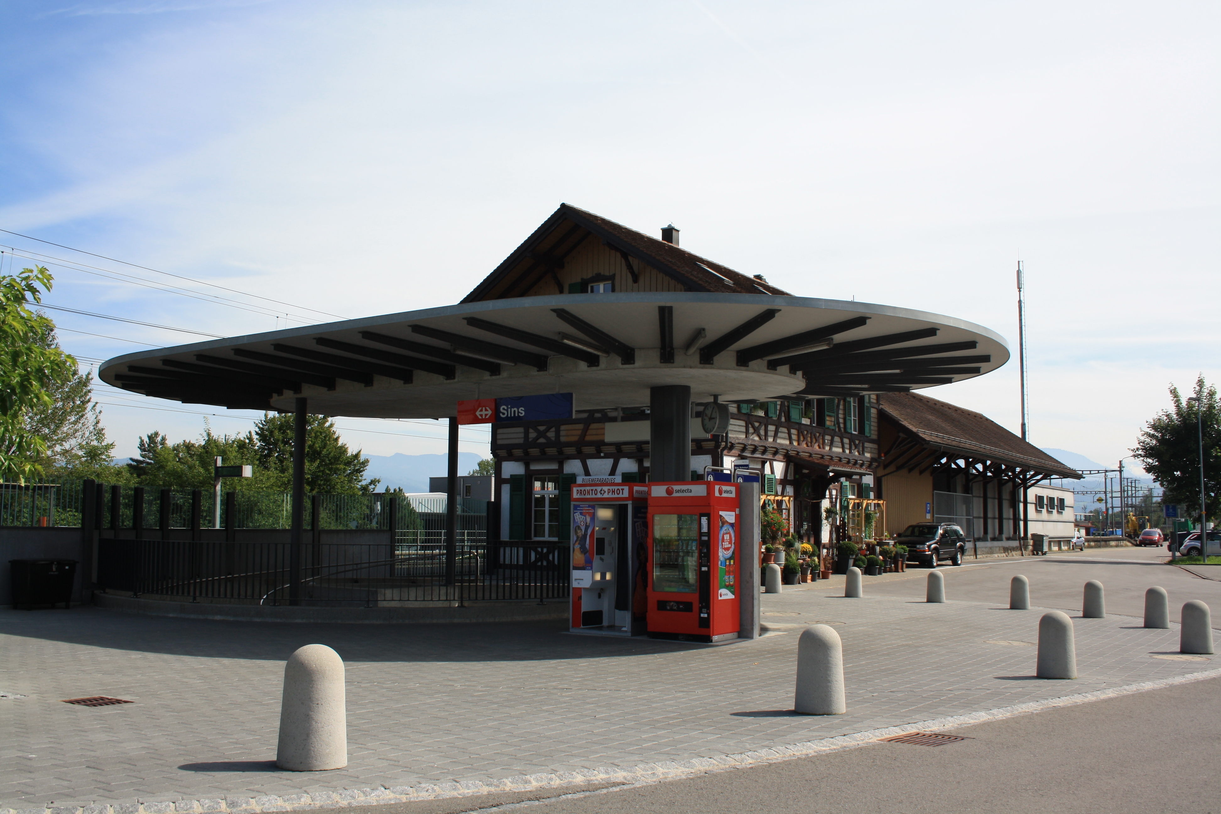 Bahnhof Sins AG, Schweiz